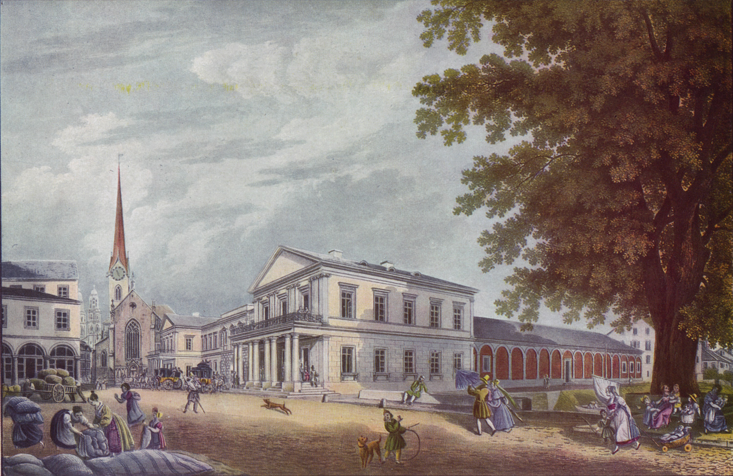 Der Posthof am Paradeplatz in Zürich um 1850. Der Posthof wurde 1838 von Hans Conrad Stadler gebaut. 1870 zum Centralhof umgebaut. Auf der rechten Seite ist die Tiefehoflinde sichtbar. Kolorierter Stich.